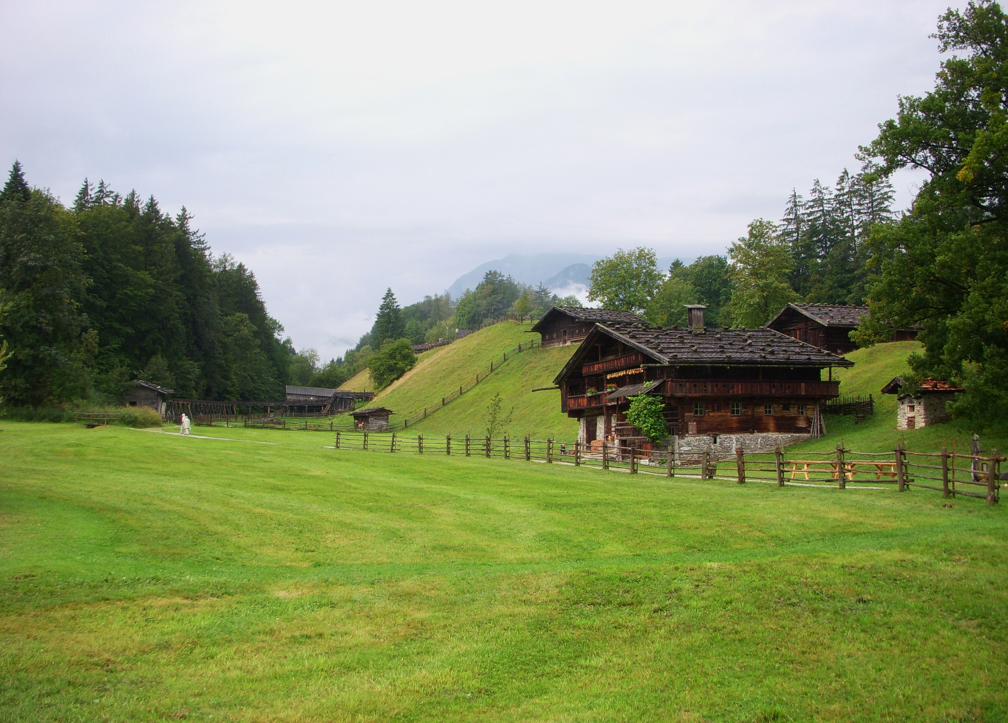 Museum Tiroler Bauernhöfe in Kramsach, Österreich